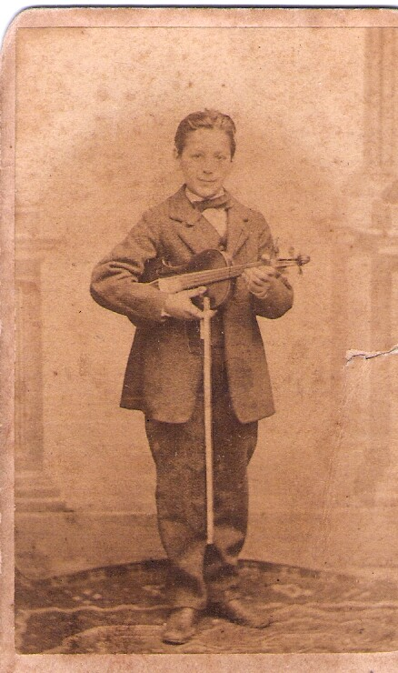 Fernando Palatín con 14 años